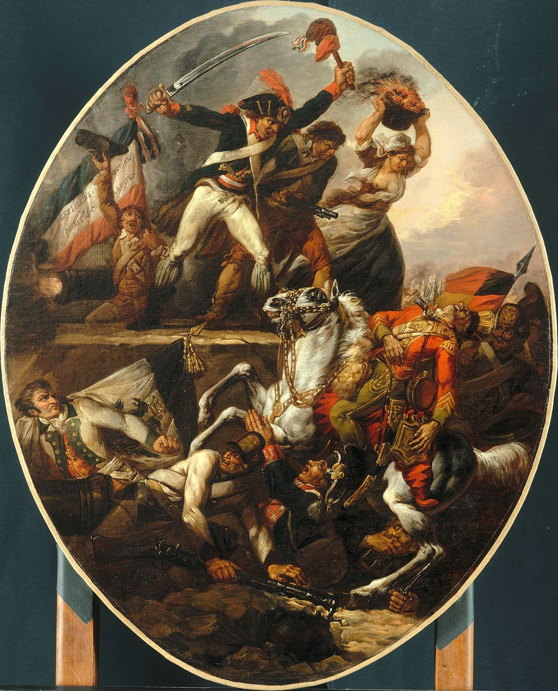 Huile sur toile conservée au Palais des Beaux-Arts de Lille.